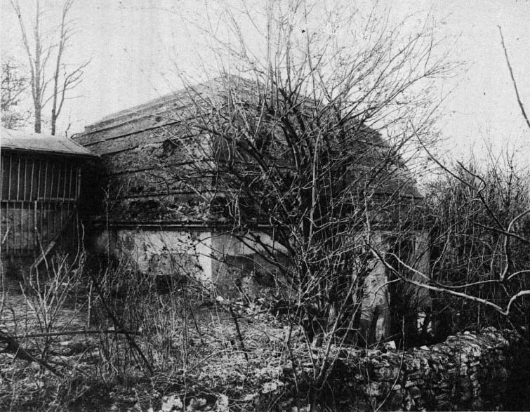 Regard des Maussins, Pré-Saint-Gervais. Photo extraite du procès-verbal de la Commission municipale du Vieux Paris, 12 octobre 1899